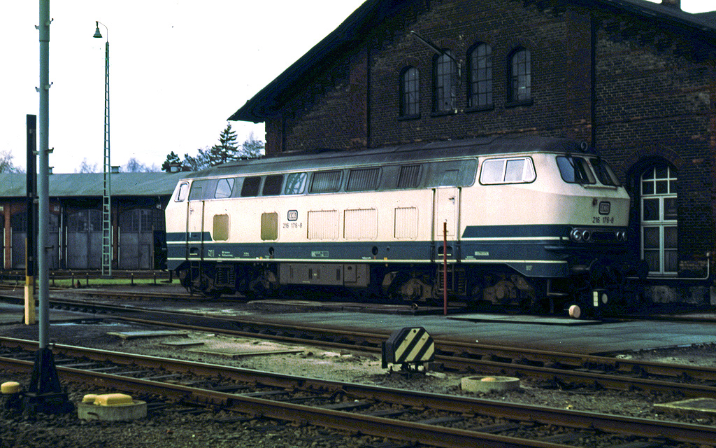 Diesellokomotive 216 176-8 am Lokschuppen des ehemaligen Bahnbetriebswerkes auf der Westseite des Bahnhofs Uelzen.